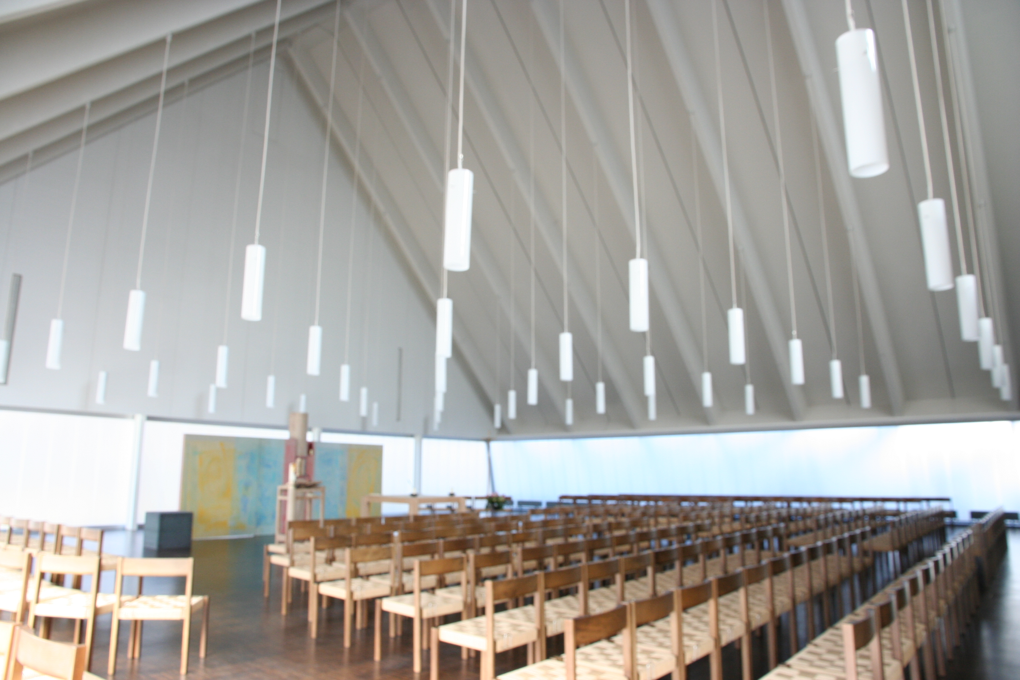 Römisch-katholische Pfarrkirche St. Franziskus Bassersdorf